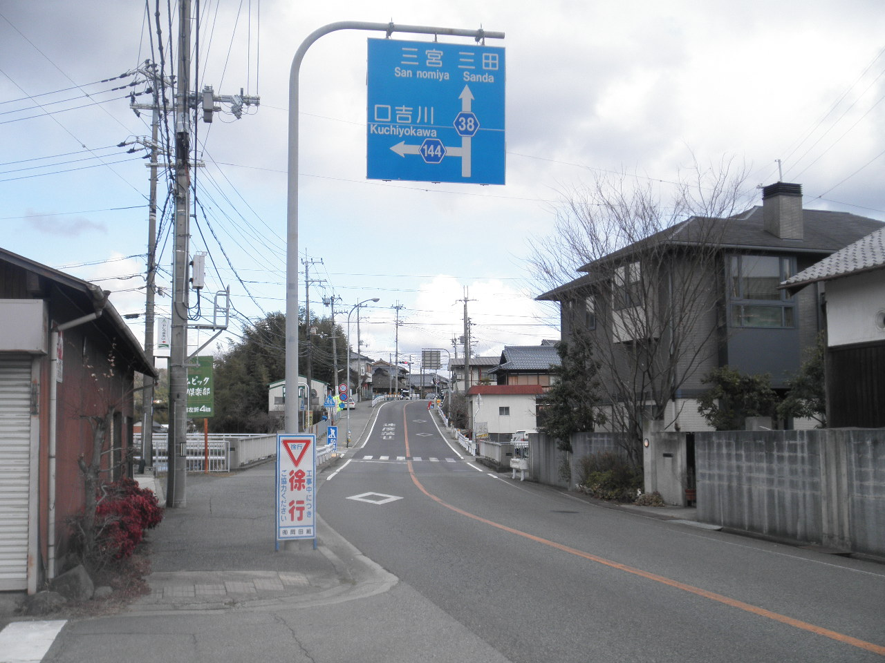 兵庫県神戸市北区淡河町淡河 兵庫県道38号三木三田線